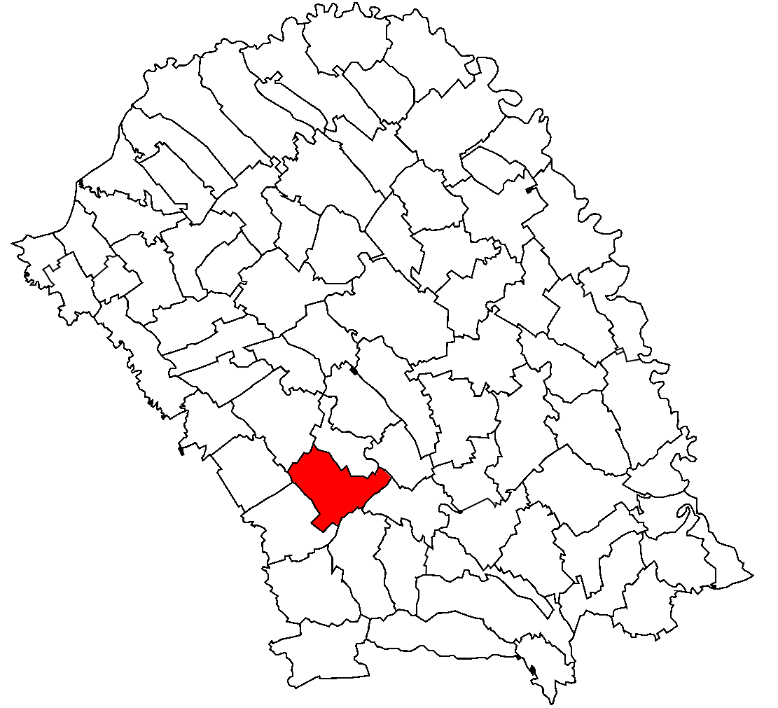 Categorie:Hărţi ale judeţului Botoşani